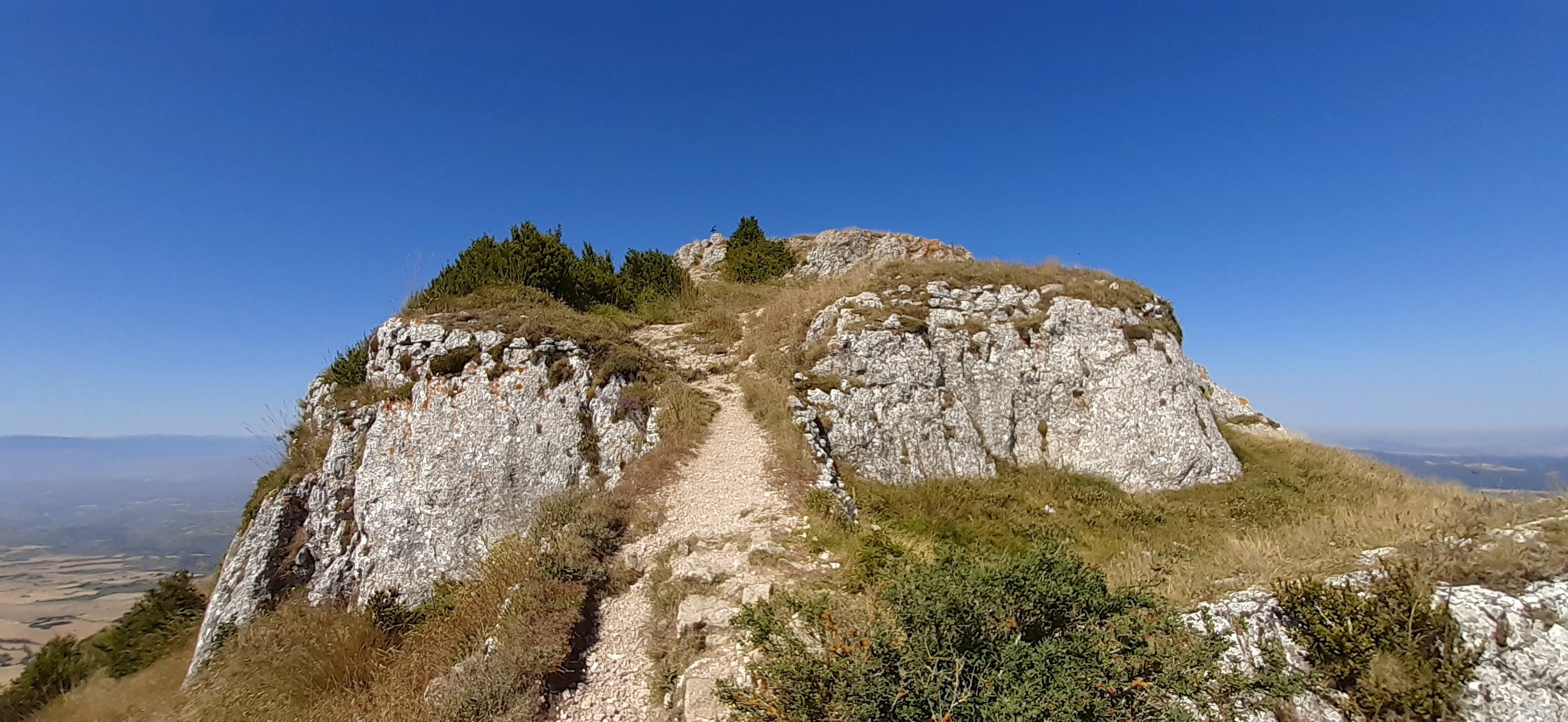 Castillo de Lapoblación mendiko ikuspegiak (Nafarroa hego-mendebaldea), tartean dela tontorra (1.245 m). Artean ikusi egiten dira Nafarroako Erresumaren behinolako Marañongo gazteluaren aztarnak, eta bertatik zabaltzen paisaia: hegoaldera Errioxa eta iparraldera Ega ibaiaren arroa.